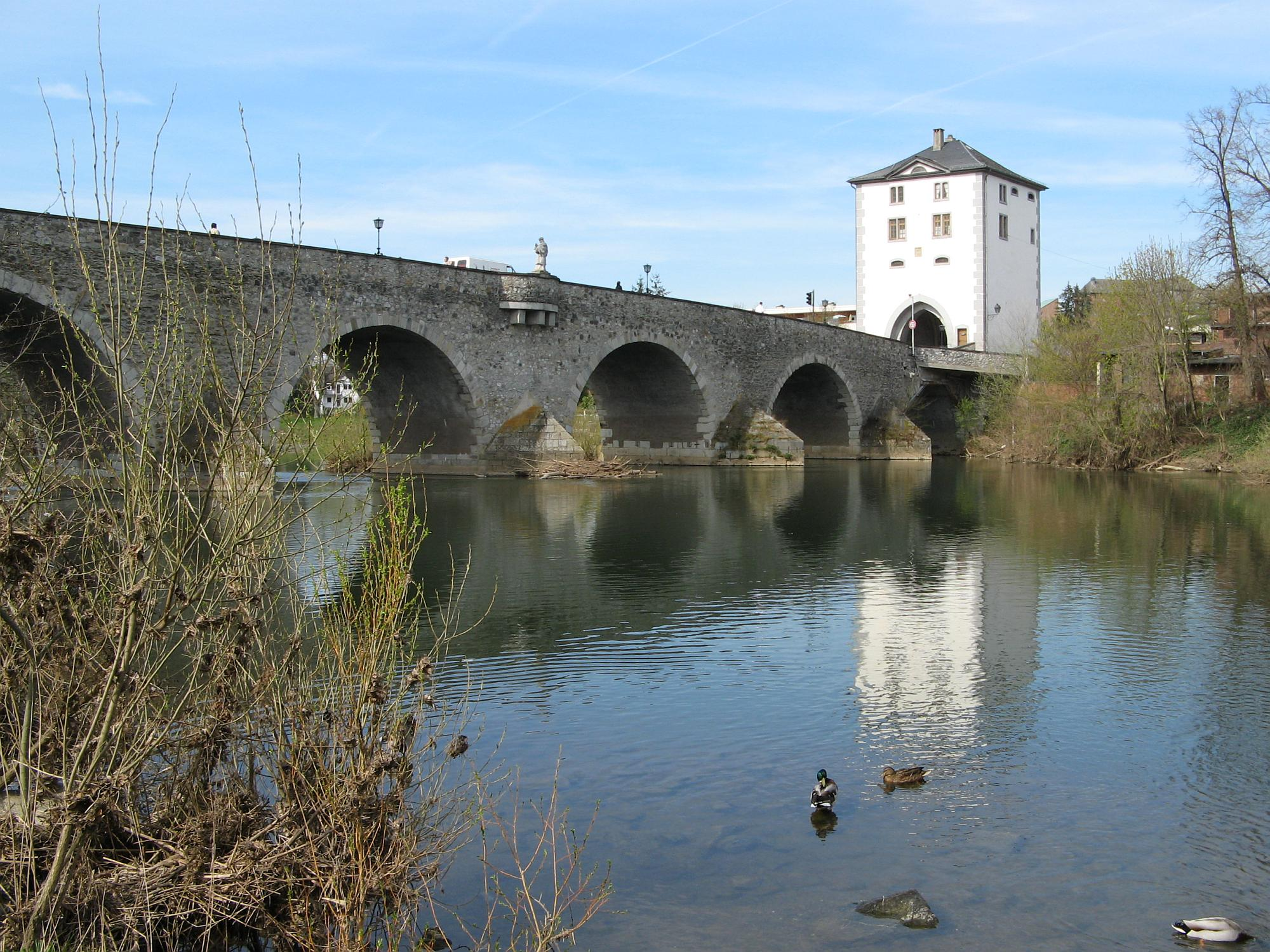 Alte Lahnbrücke mit Brückenturm in Limburg, Lahnübergang der Via Publica von 1341